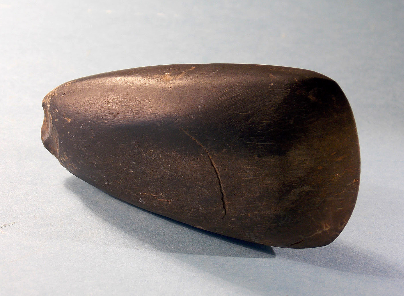 El hacha lítica pulimentada que se descubrió en la Cueva de la Garma C (Omoño, Ribamontán al Monte) en el año 2.000 es un ejemplo del uso de esta técnica y un testigo excepcional del inicio de la producción de alimentos que hoy es la base de nuestro modelo productivo. Se trata de la primera revolución económica global que afectó definitivamente a todos los ámbitos de la vida hasta la actualidad.